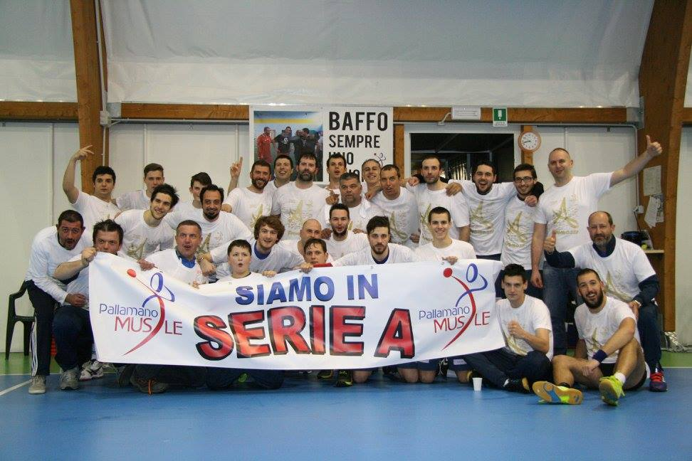 La squadra della promozione in A1